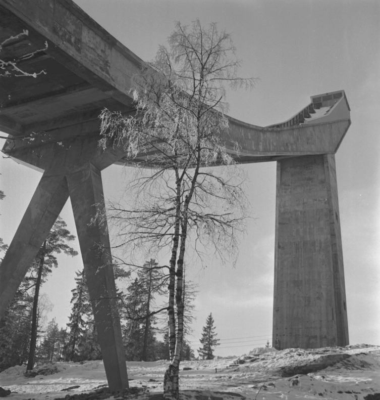 Holmenkollbakken in Oslo, Norway